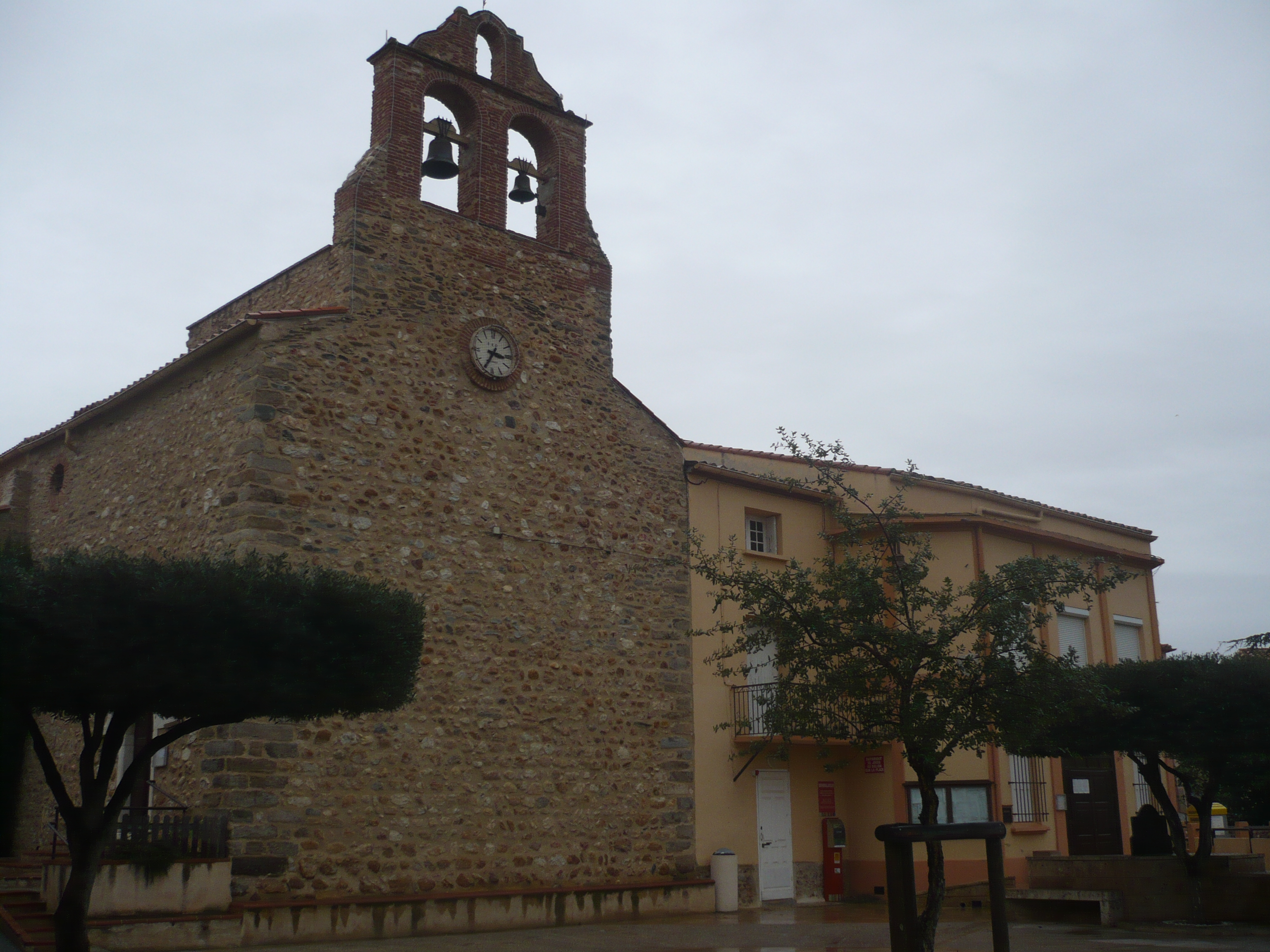 Église Saint-Saturnin à Tresserre